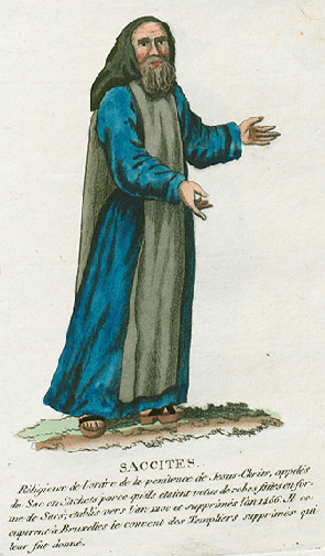 Collection de costumes de tous les ordres monastiques, supprimés à differentes époques, dans la ci-devant Belgique, Bruxelles, Philippe Joseph Maillart et sœur, 1811